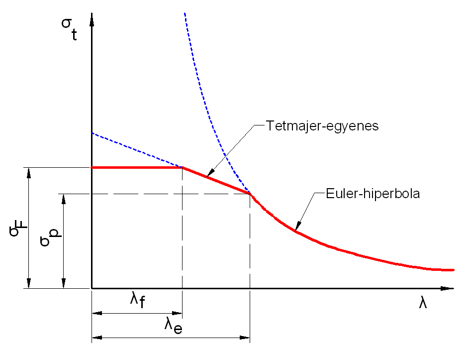 Kihajlás törőfeszültsége